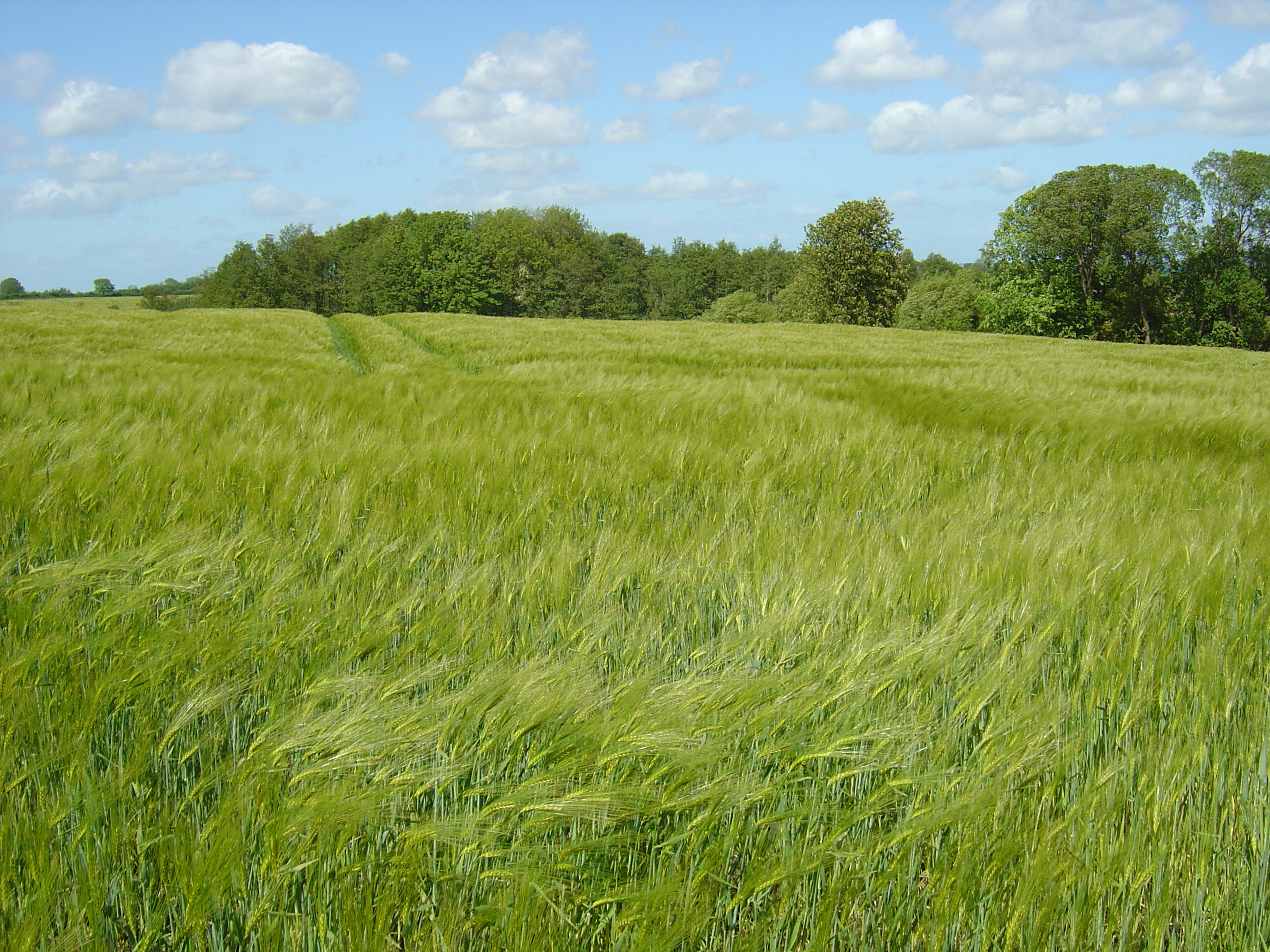 Wanderung im Habernisser Moor/Niederung, der Weg führt entlang von Kornfeldern